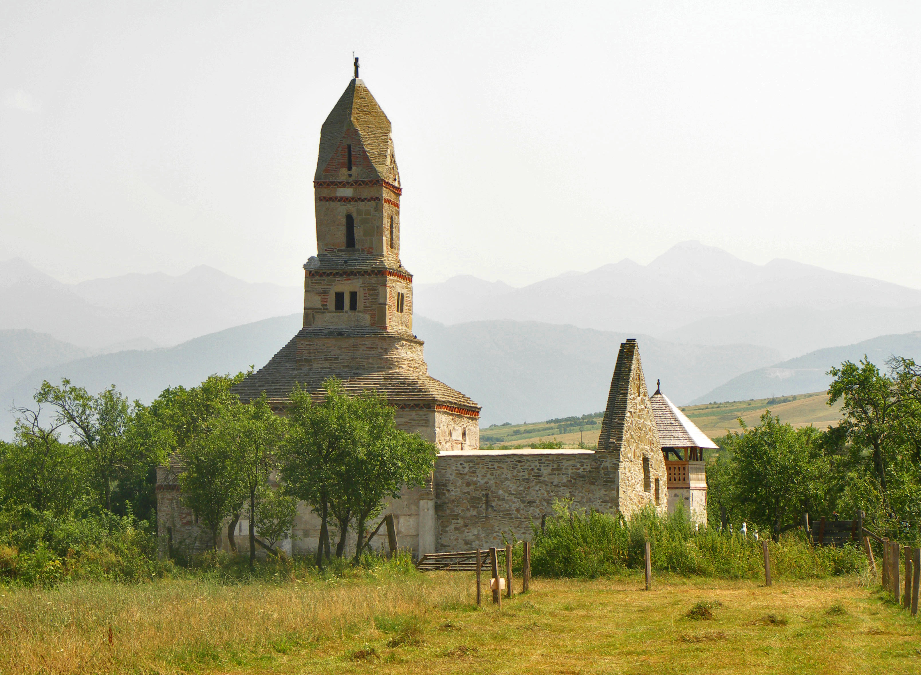 Densuş, Hunedoara: biserica de piatra medievală. Vedere dinspre nord.